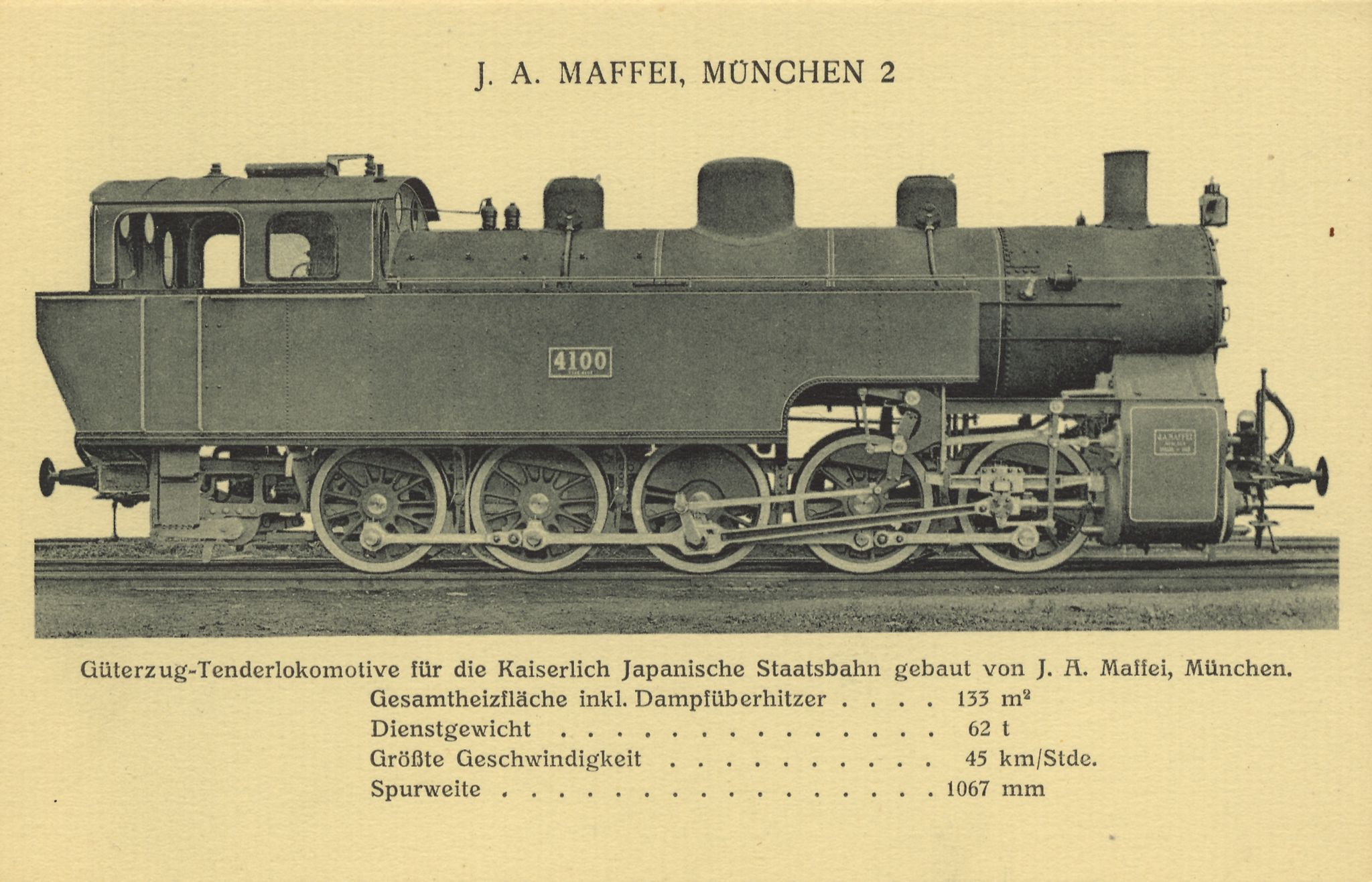 Güterzugtenderlokomotive für die Kaiserlich Japanische Staatsbahn, gebaut von J. A. Maffei